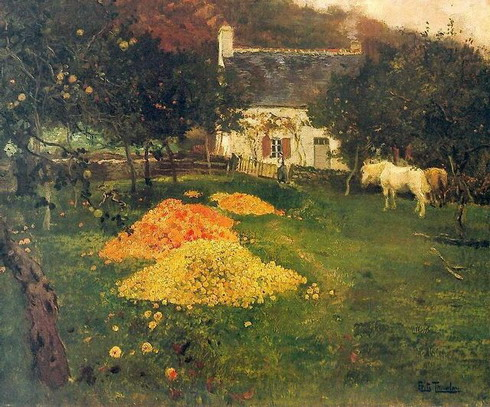 Зображення фруктового саду і зборів яблук наприкінці літа